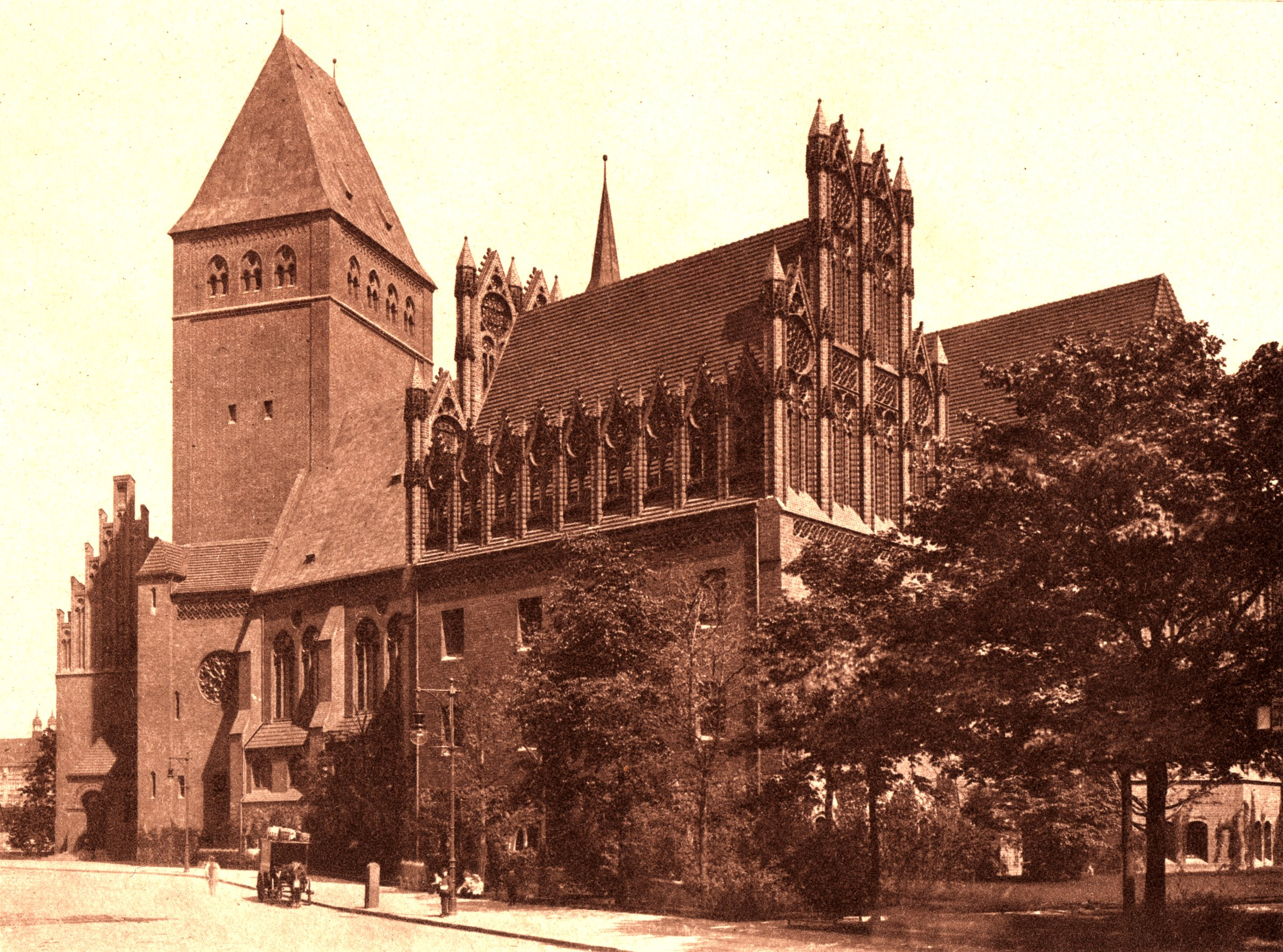 Berlin - Märkisches Museum, Ansicht 1908